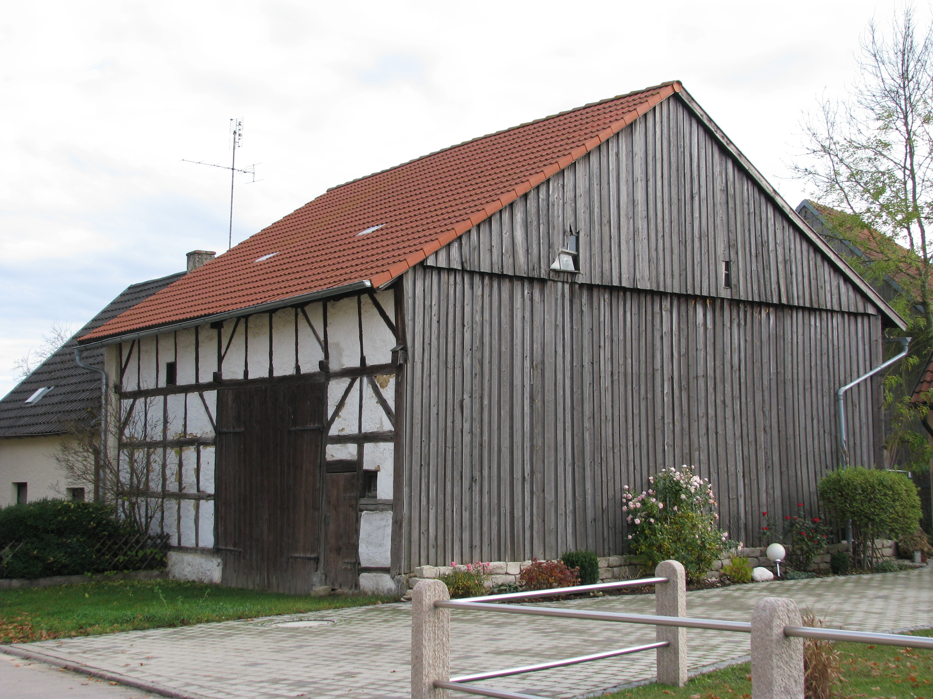 Kaising, Ortsteil der Stadt Greding im mittelfränkischen Landkreis Roth in Bayern, Fachwerkstadel